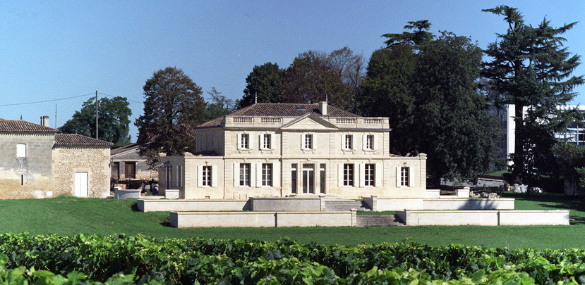 Le Château Haut Piquat, AOC Lussac Saint Emilion